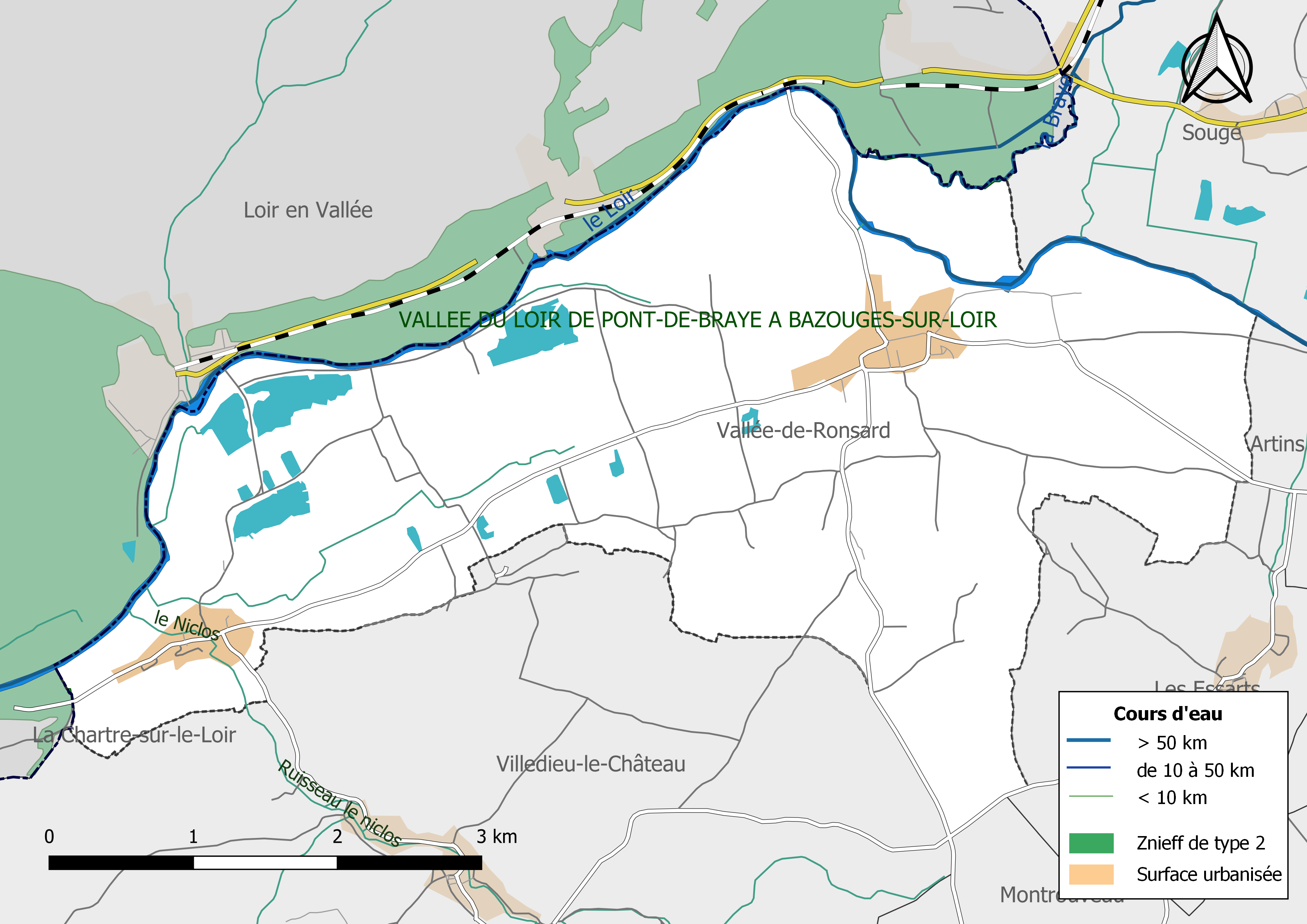 Zones naturelles d'intérêt écologique faunistique et Floristique (ZNIEFF) de type 2 de la commune de Vallée-de-Ronsard (Loir-et-Cher, France).